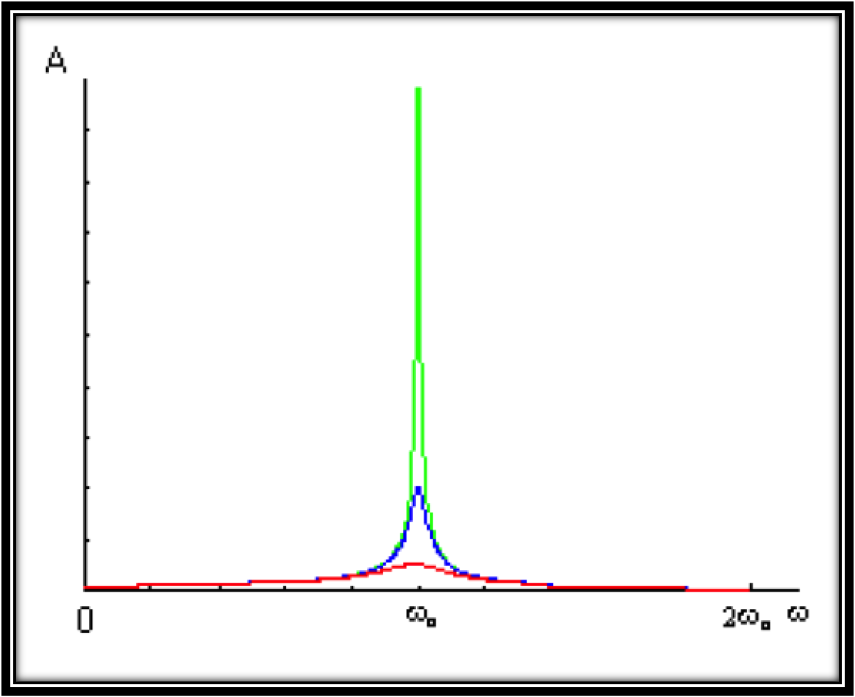 grfica